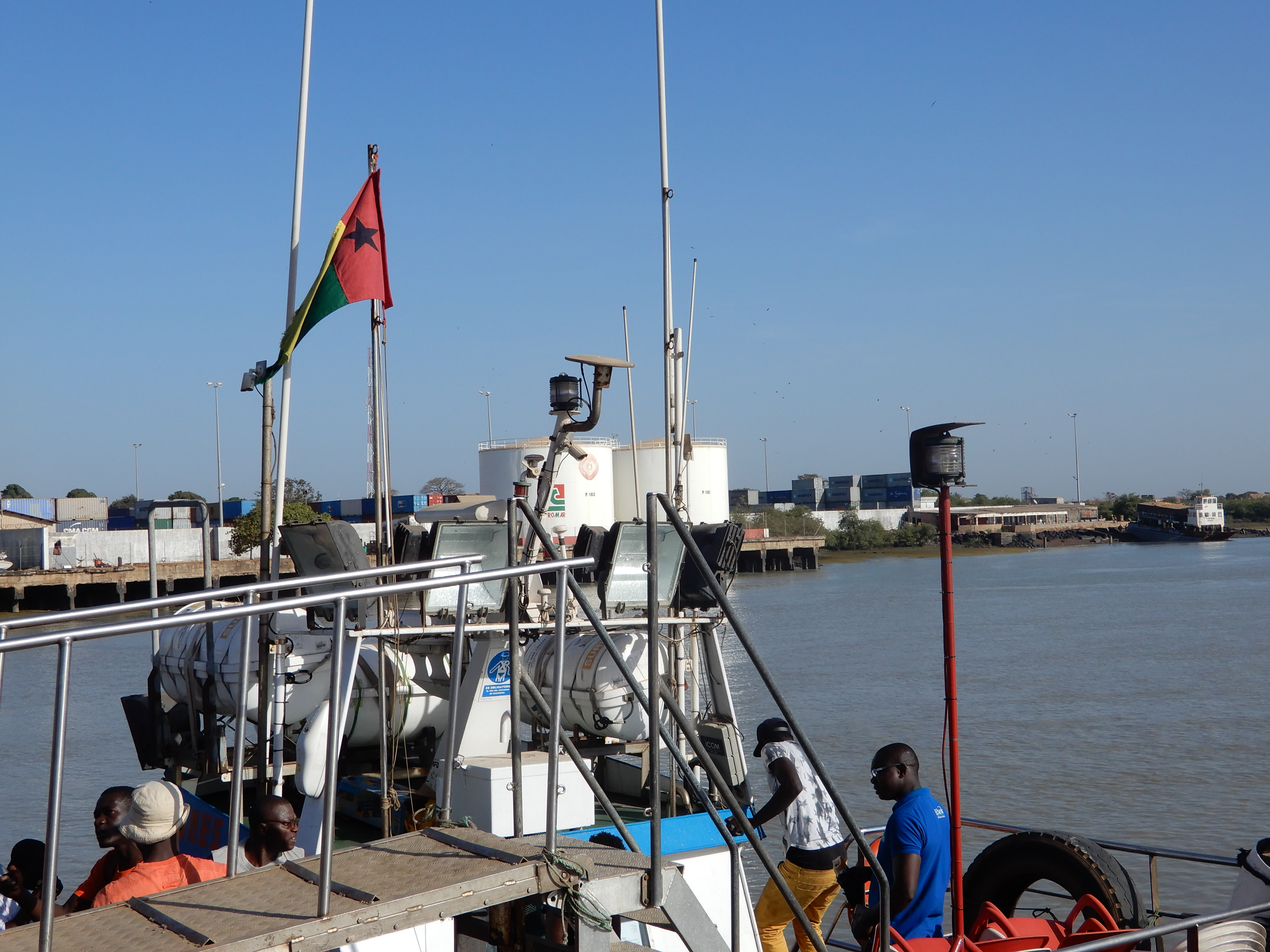 Viagem de Bissau para Bolama, Guiné-Bissau